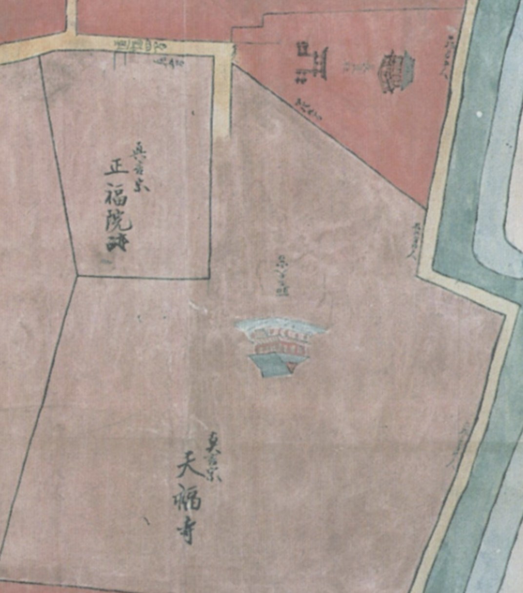 館林代官町長良神社 嘉永年間の長良神社 嘉永元年館林城下地図より抜粋 別当寺である天福寺も見える